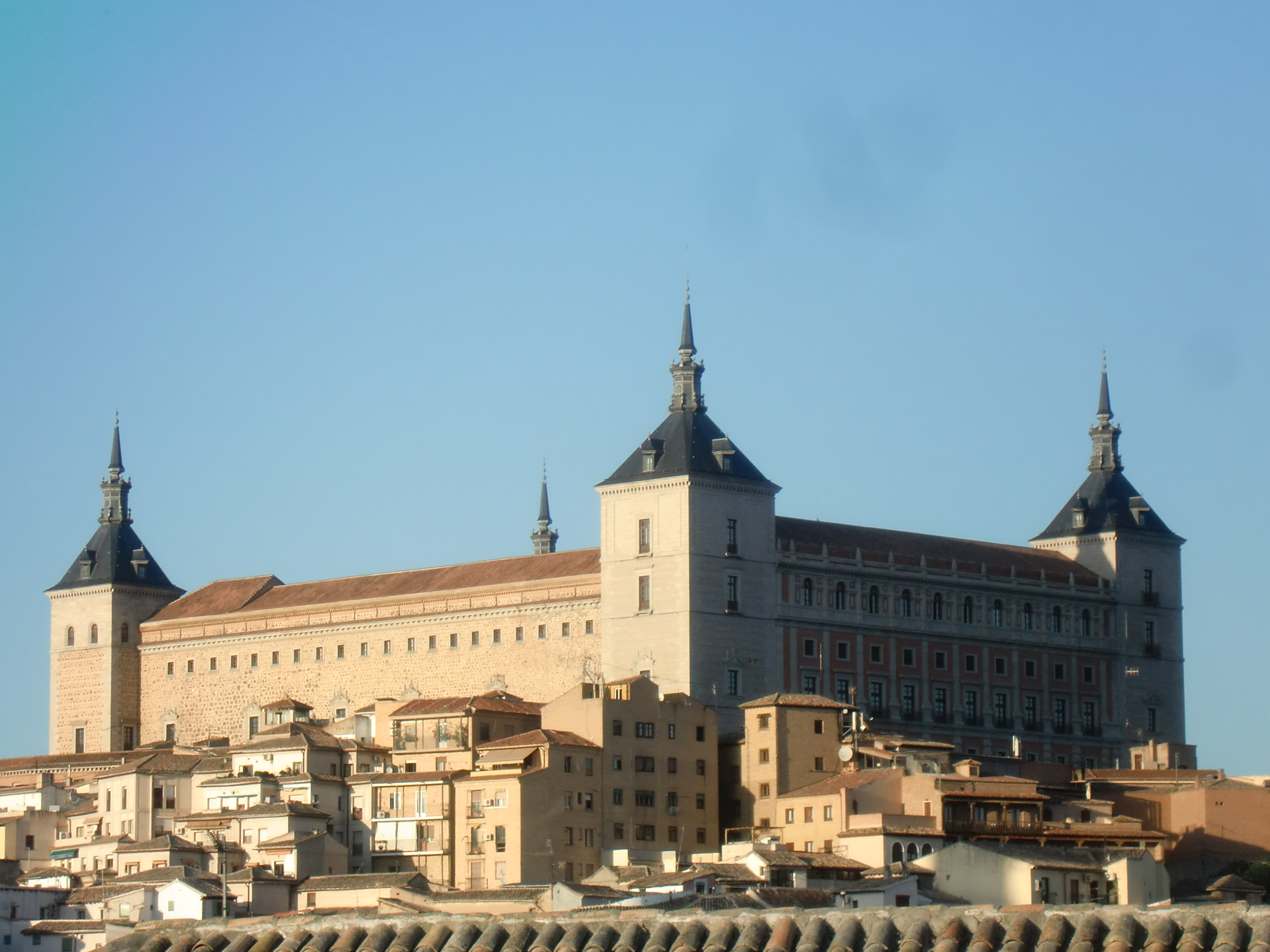 El edificio del Alcázar se levanta entre las viviendas e intrincadas calles de Toledo. Desafía a la luz del atardecer que poco a poco deja de acariciar cada ladrillo de la estructura. Los años y las guerras no han impedido que los toledanos hayamos reconstruido una y otra vez este monumento símbolo de una ciudad de la que nos sentimos orgullosos.